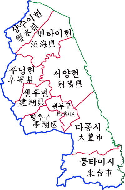 강소성 옌청시 현급구역